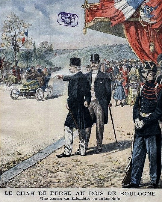 Le Chah de Perse au bois de Boulogne pour la course du kilomètre (septembre 1902) - Supplément Illustré du Petit Journal, 21 septembre 1902